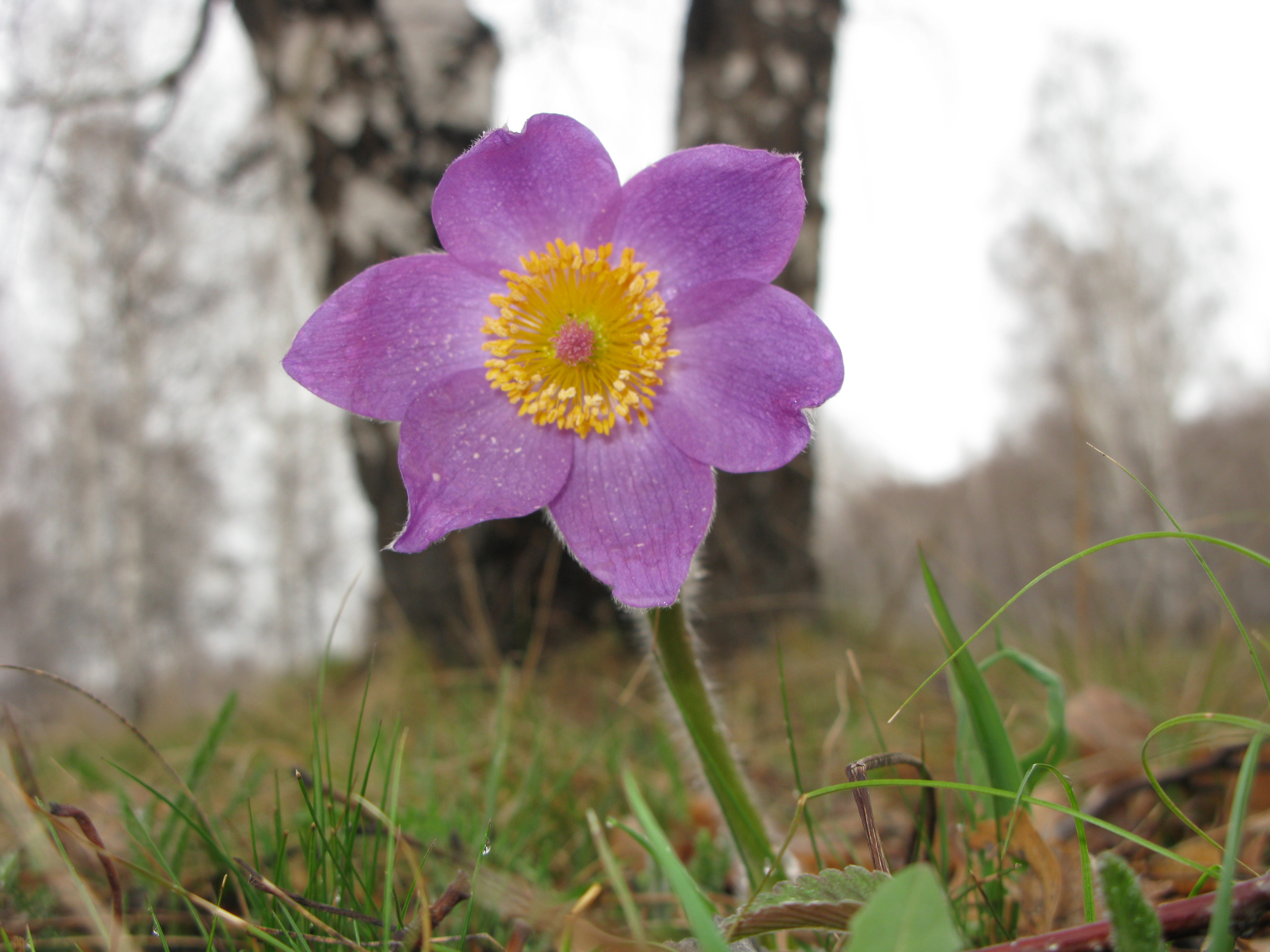 Россия, Южный Урал